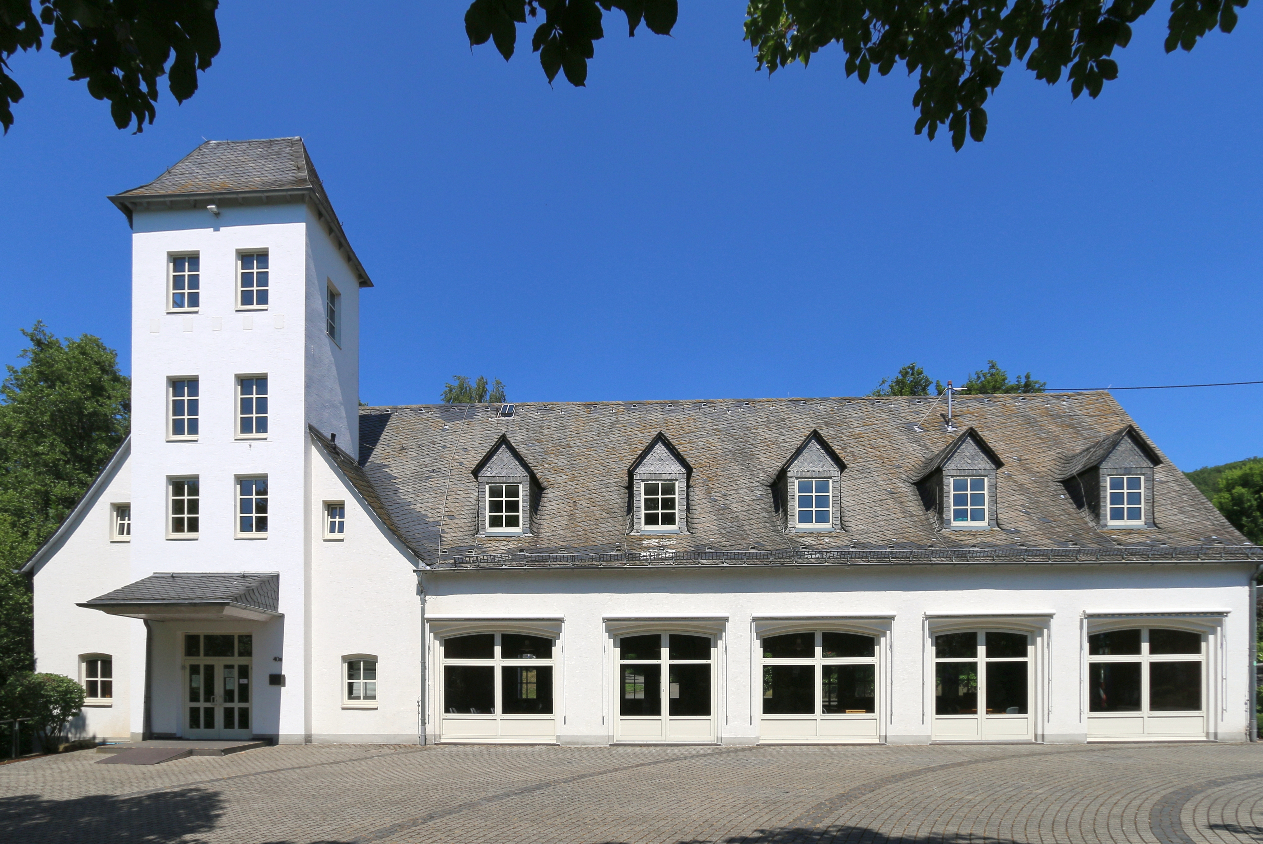 Westerburg, Westerwald: Ehemaliges Spritzenhaus